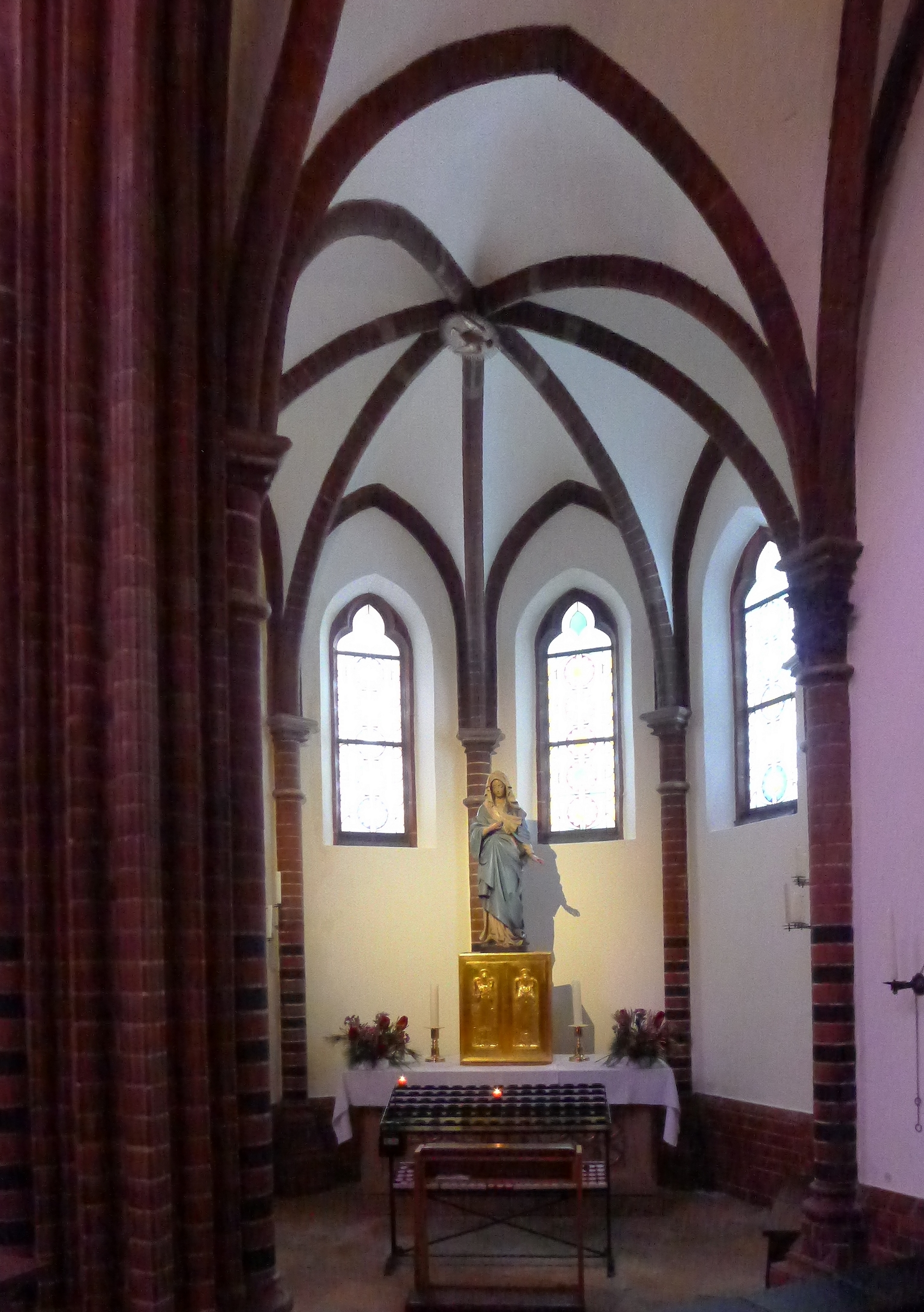 Rechtes Seitenschiff mit Blick auf die Marienkapelle.